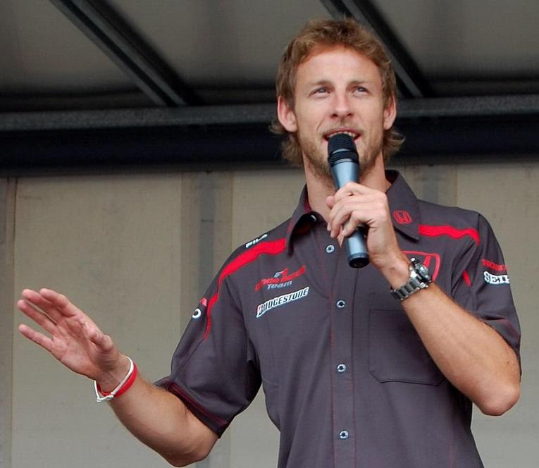 Jenson Button in 2007.